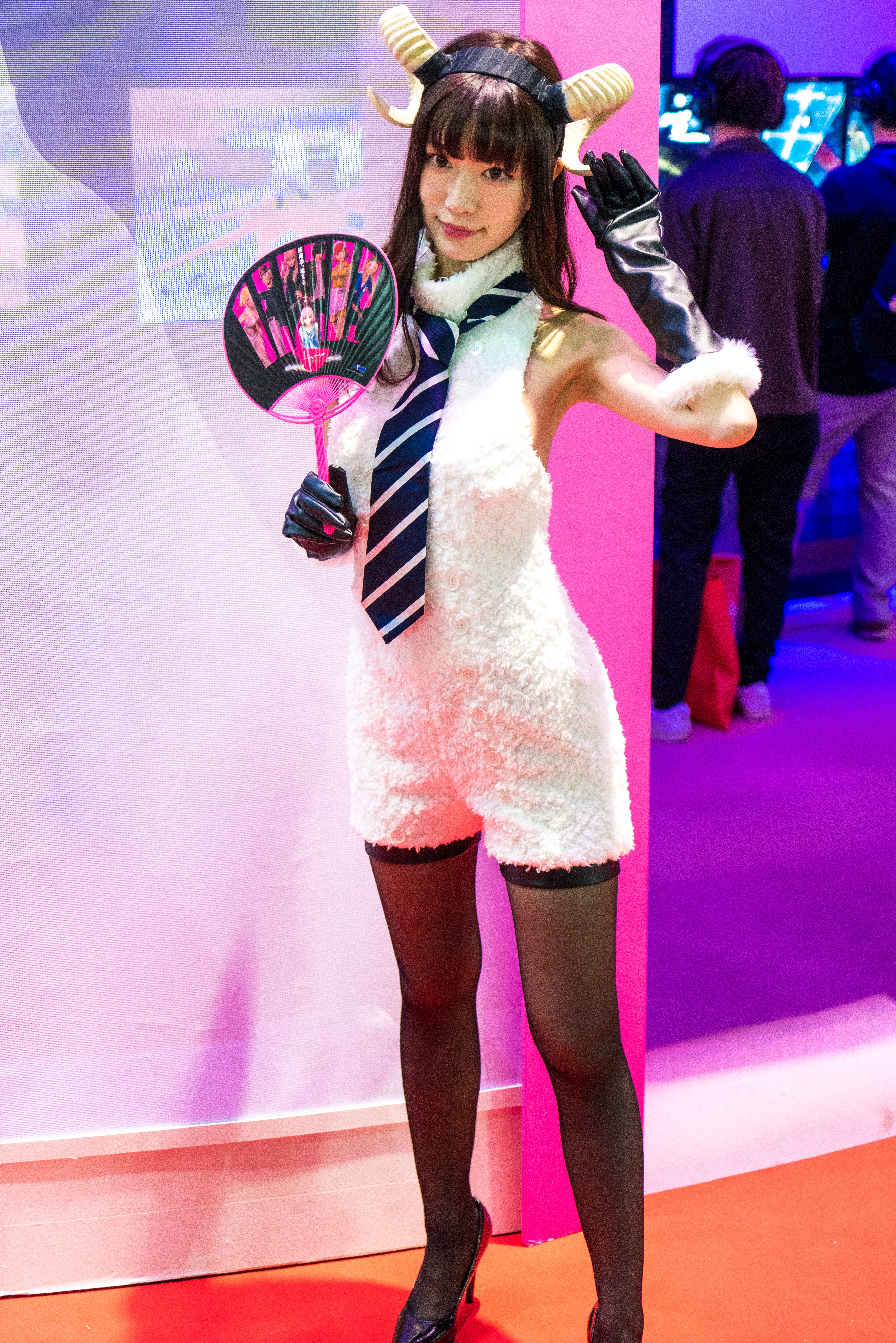 Tokyo Game Show 2018